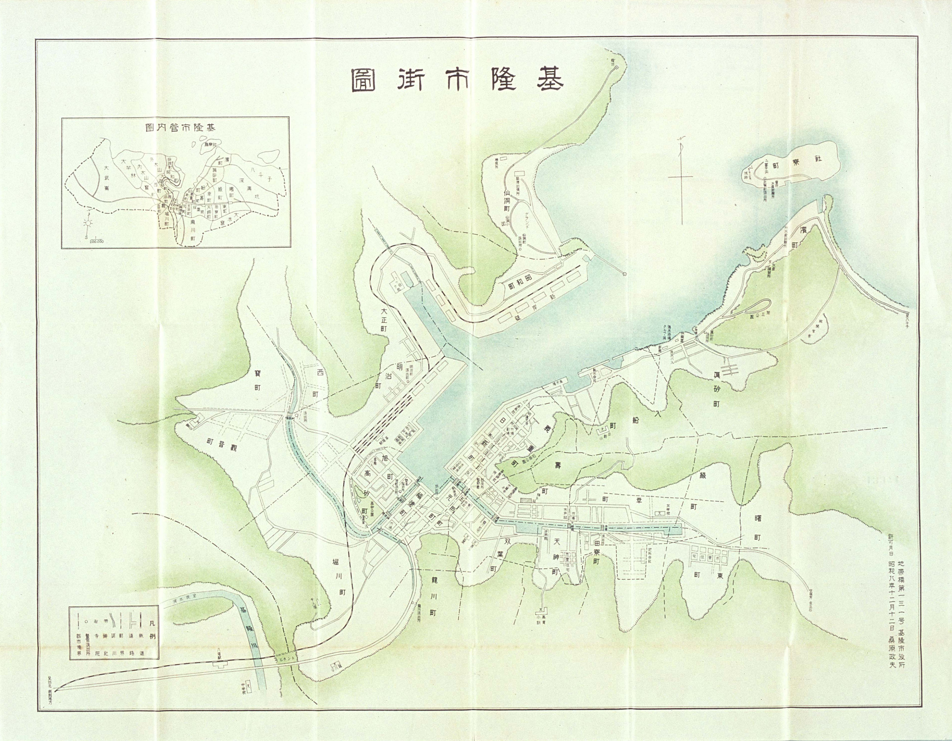 圖中可見基隆市區主要設施名稱與位置，以及各町、大字分區。